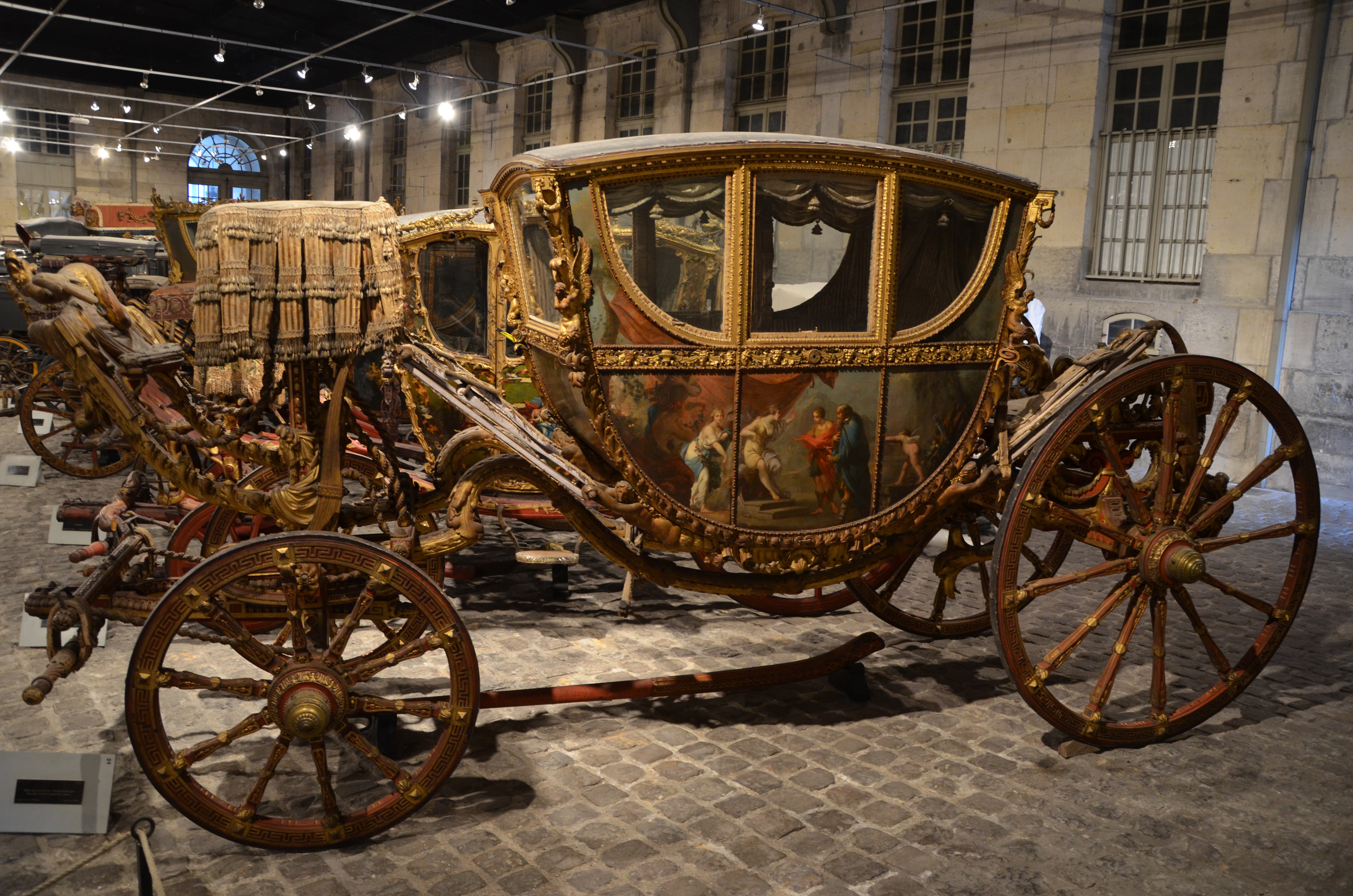 Berline der italienischen Familie Tanara im Musée National de la Voiture et du Tourisme à Compiègne, Oise, Picardie